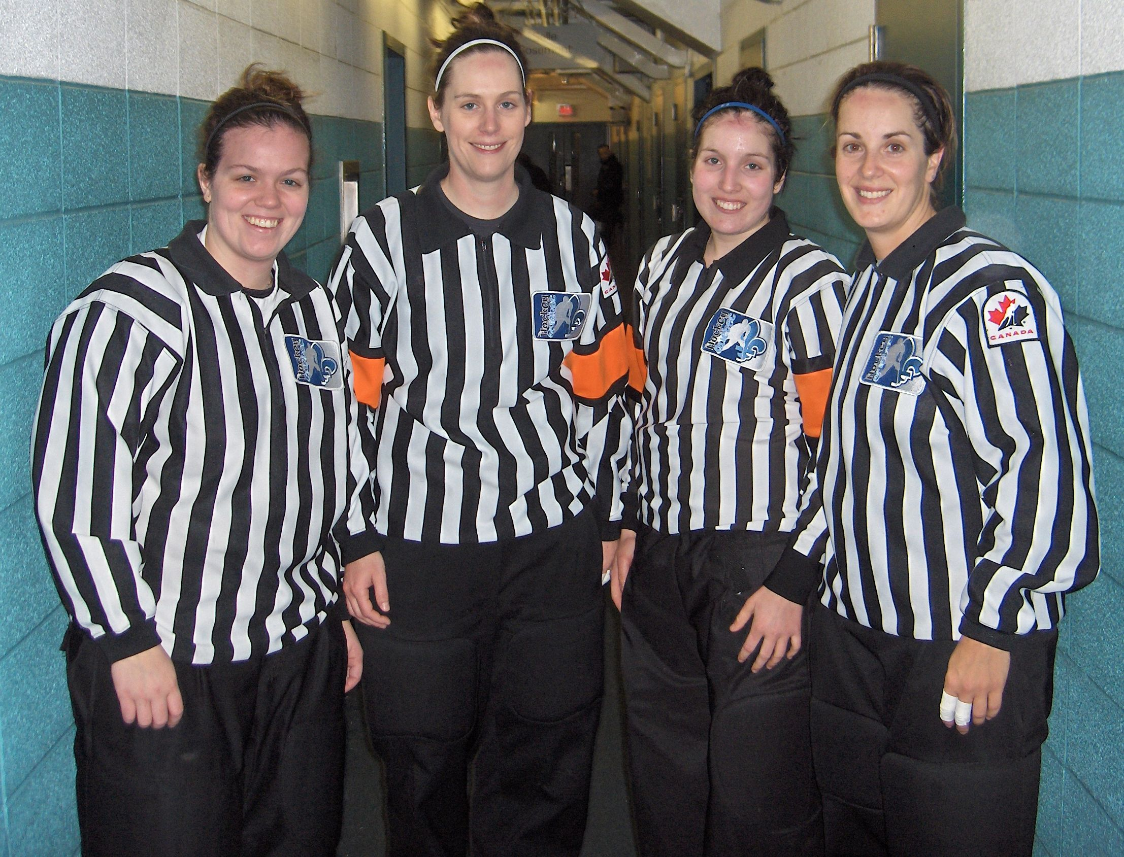 Arbitres officiels du match de hockey